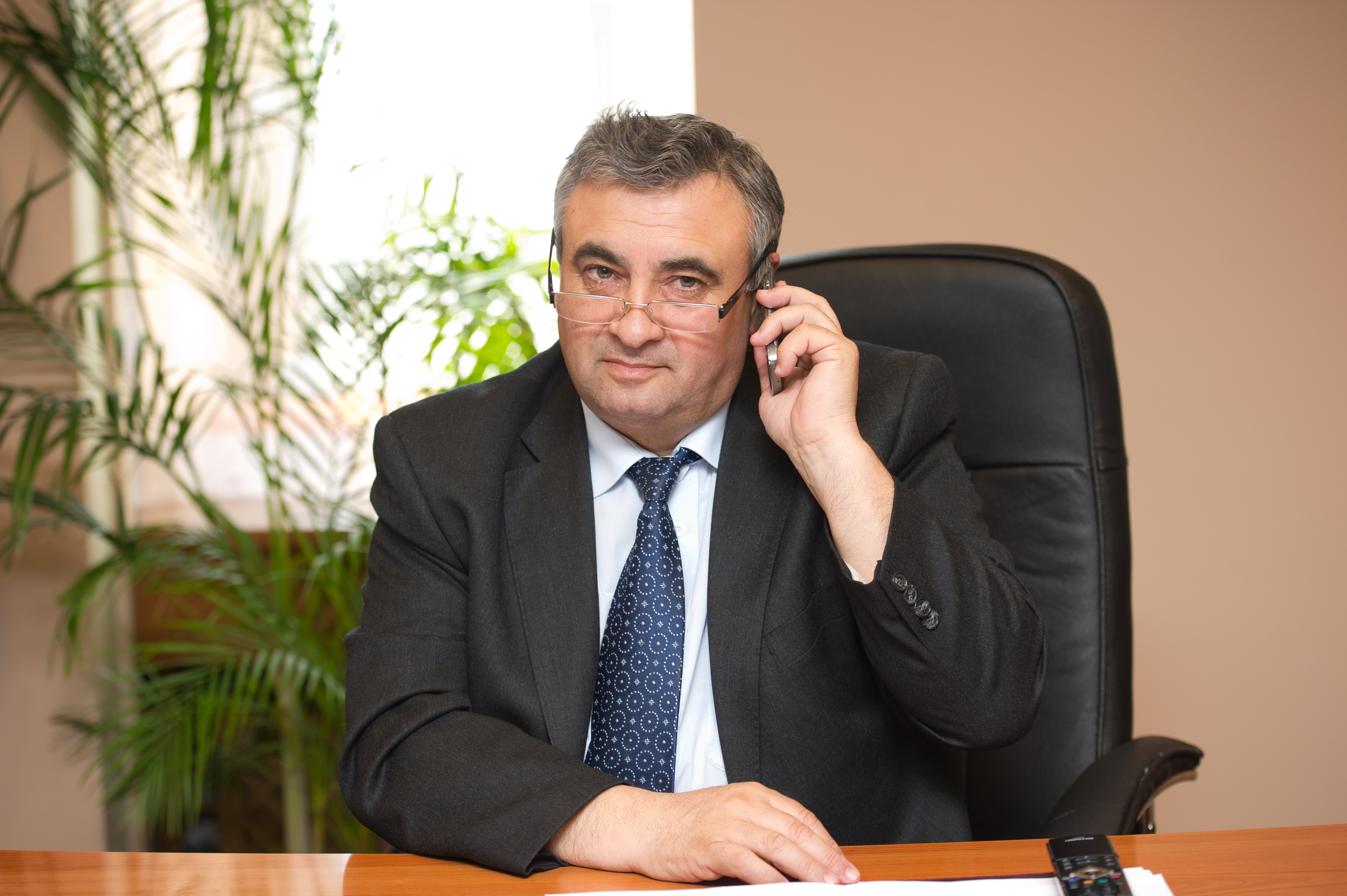 Senator al României 2004 - 2008, Secretar general al Senatului României